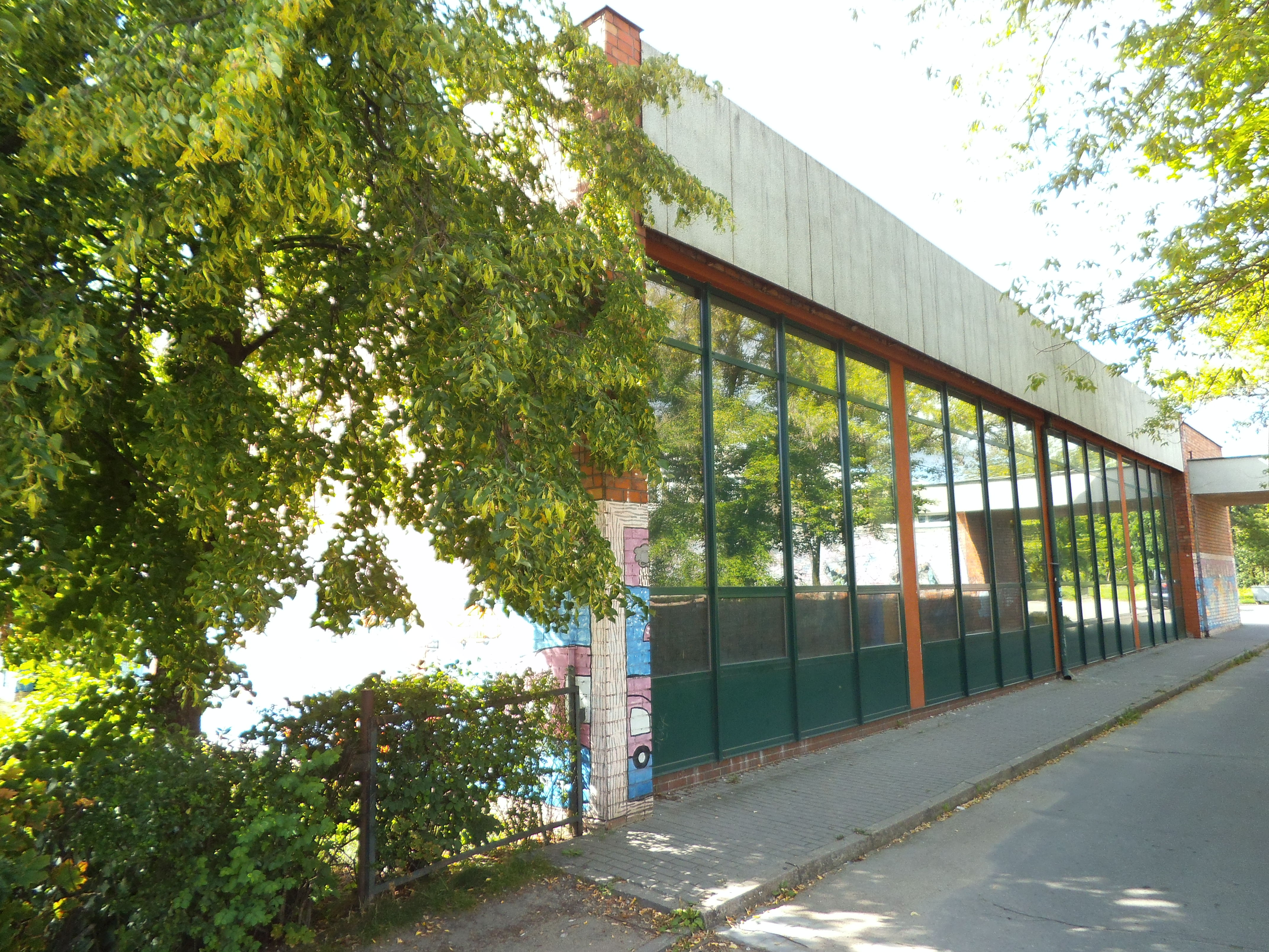 Sala gimnastyczna UMK na Bielanach8